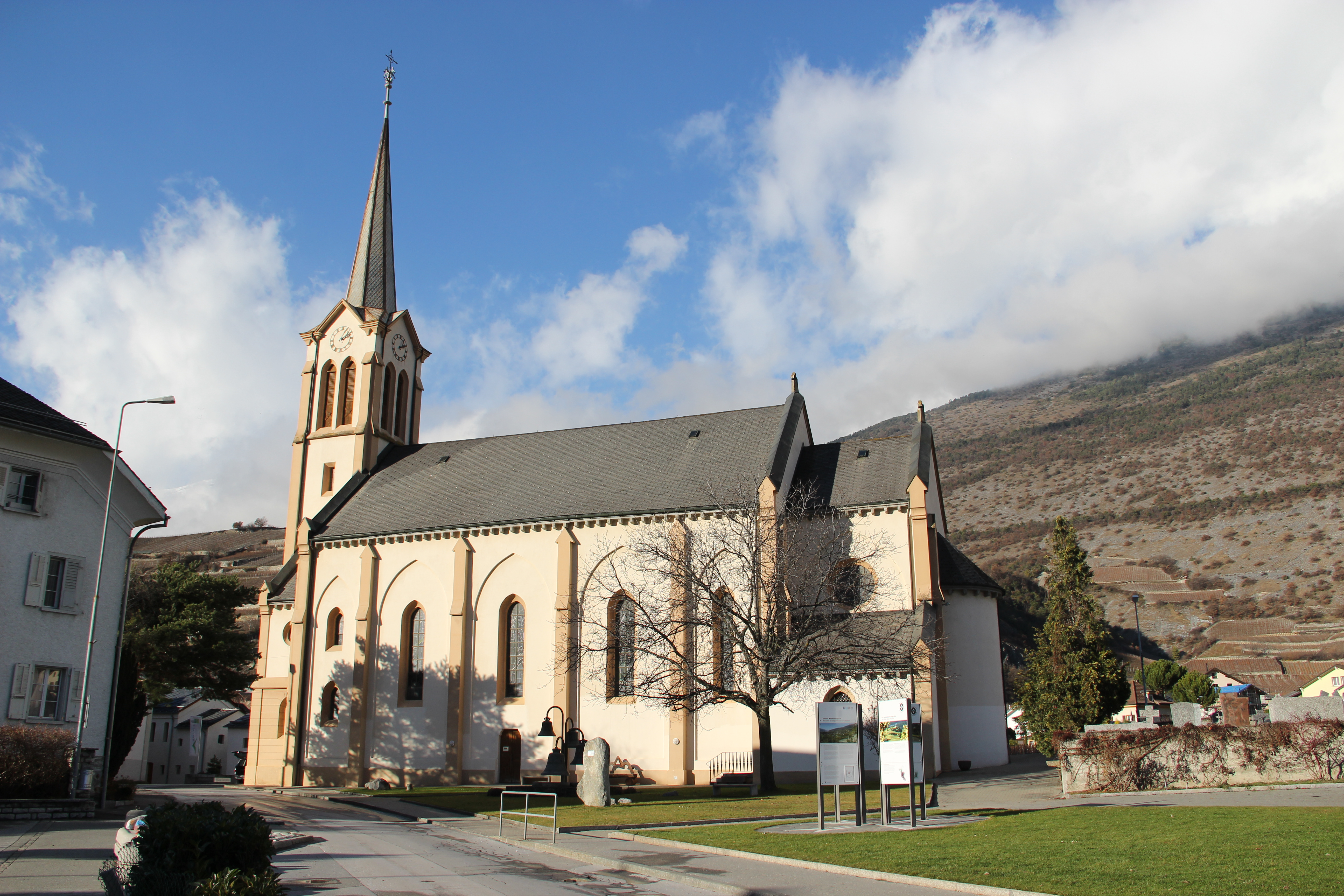 Kirche St. Johann Baptist